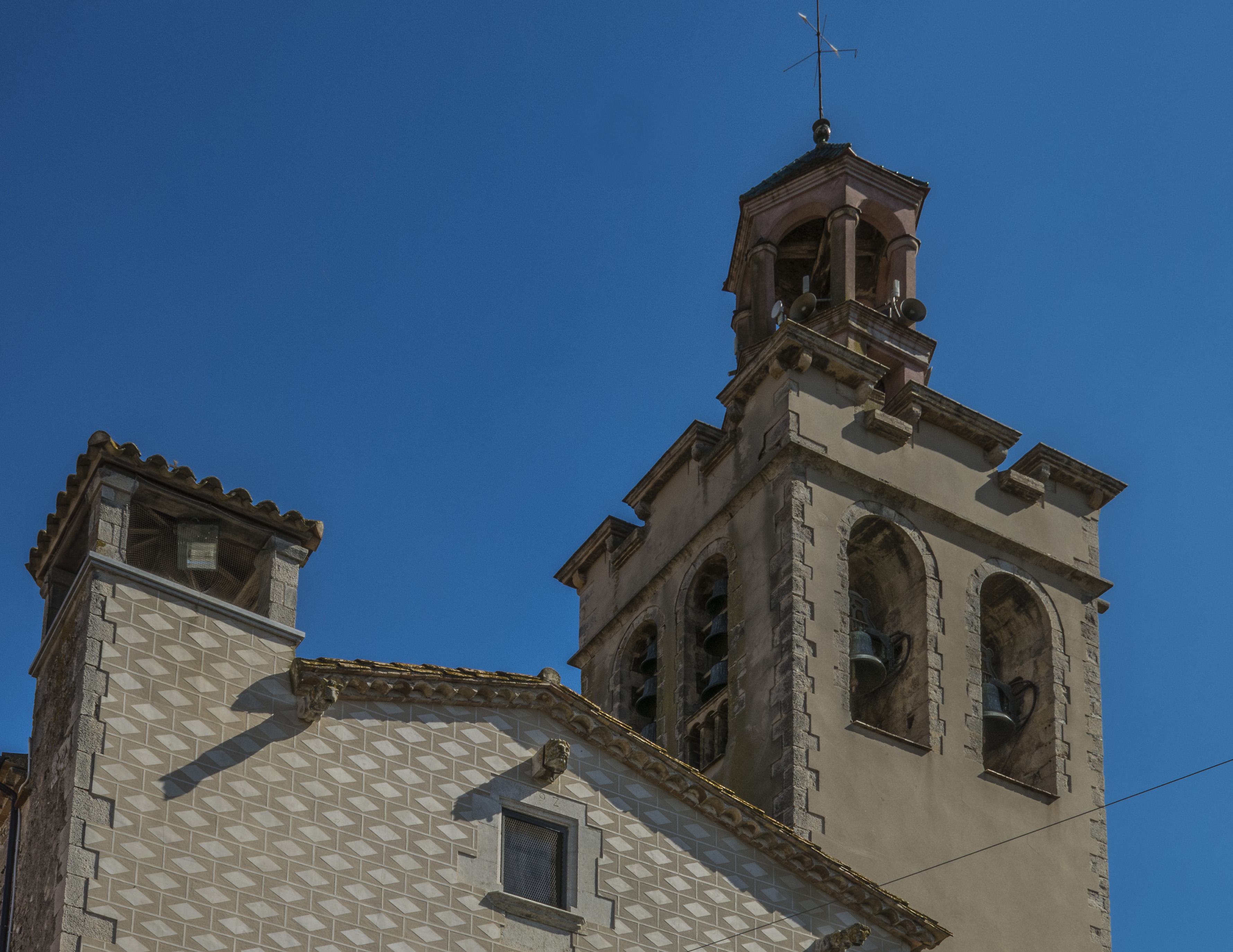 Riudellots de la Selva és un municipi de la comarca de la Selva que forma part de l'àrea urbana de Girona.